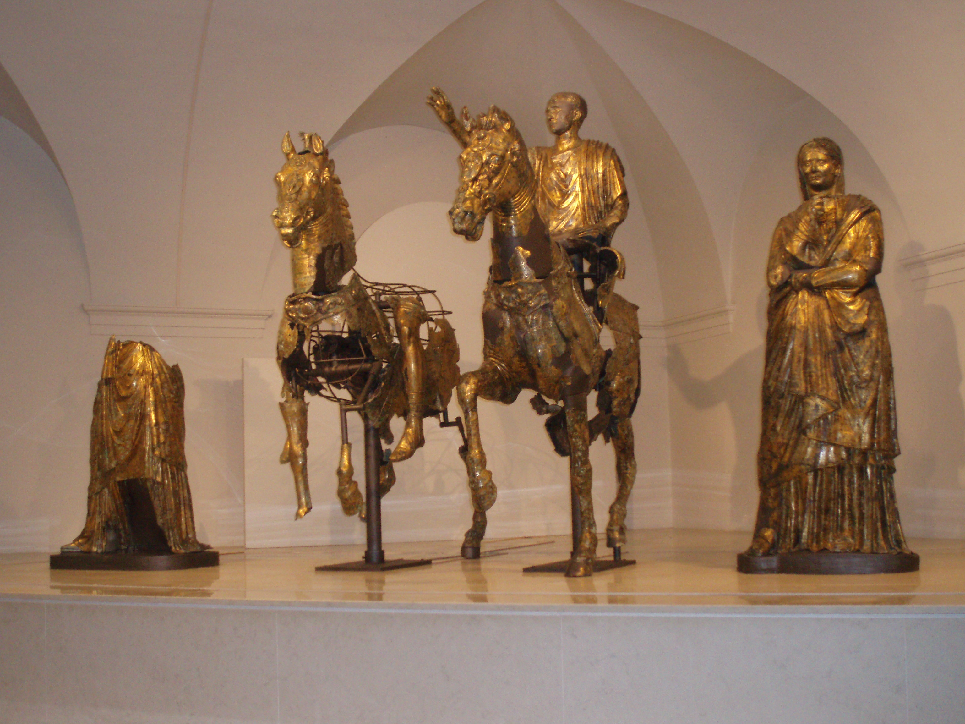 Bronzi dorati da Cartoceto di Pergola - 10